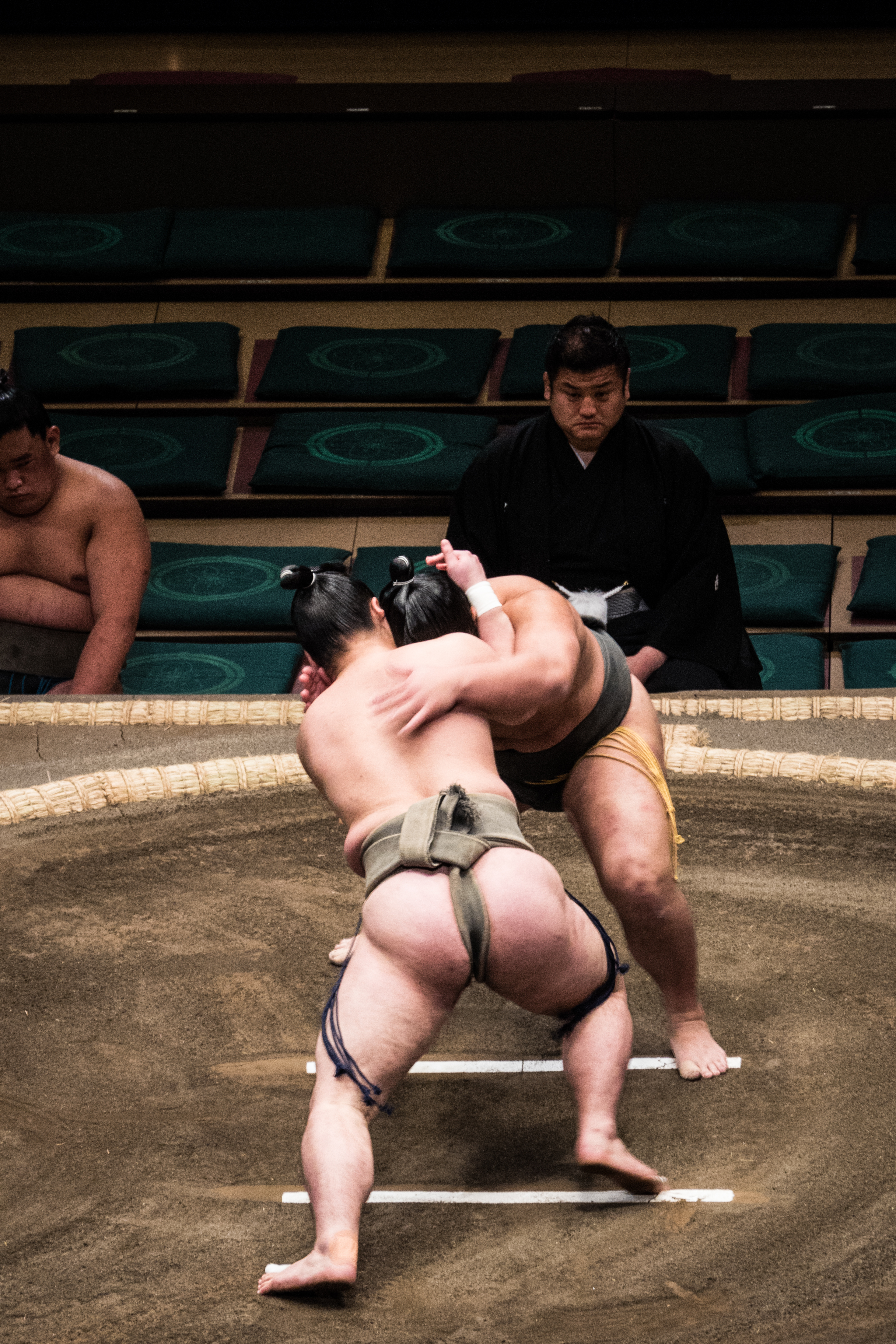 Lluita de sumo This photo has been taken in the country: Japan